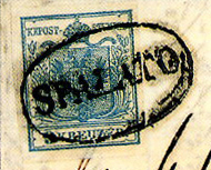 Première oblitération de Spalato: ovale Mueller type RO, 100x6 points. Lettre lot 228 vendu 2000 FS en 2003 (collection Jerger par Corinphila).